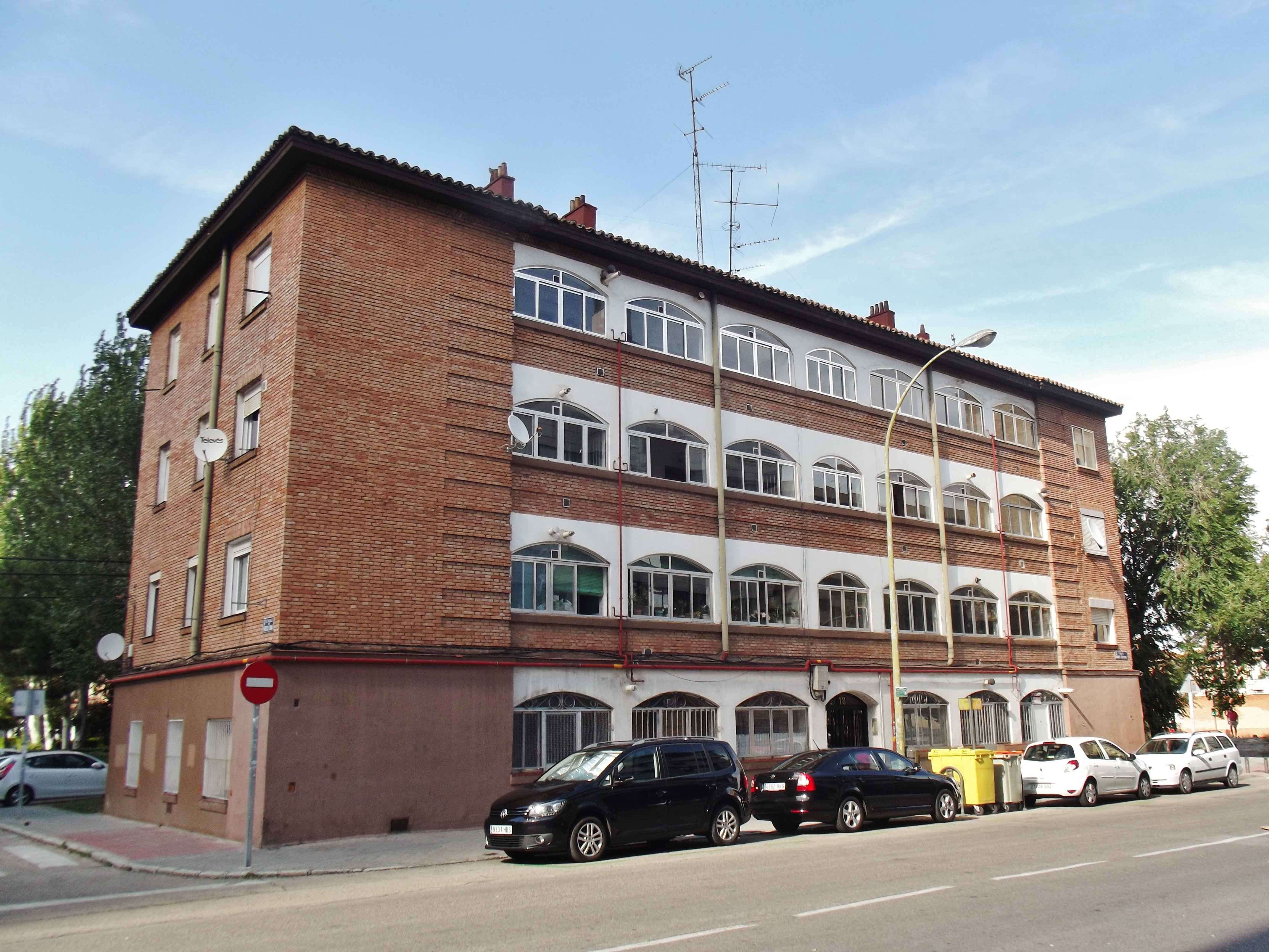 Edificio en el número 18 de la calle Manuel Caldeiro (colonia San Cristóbal), Madrid.